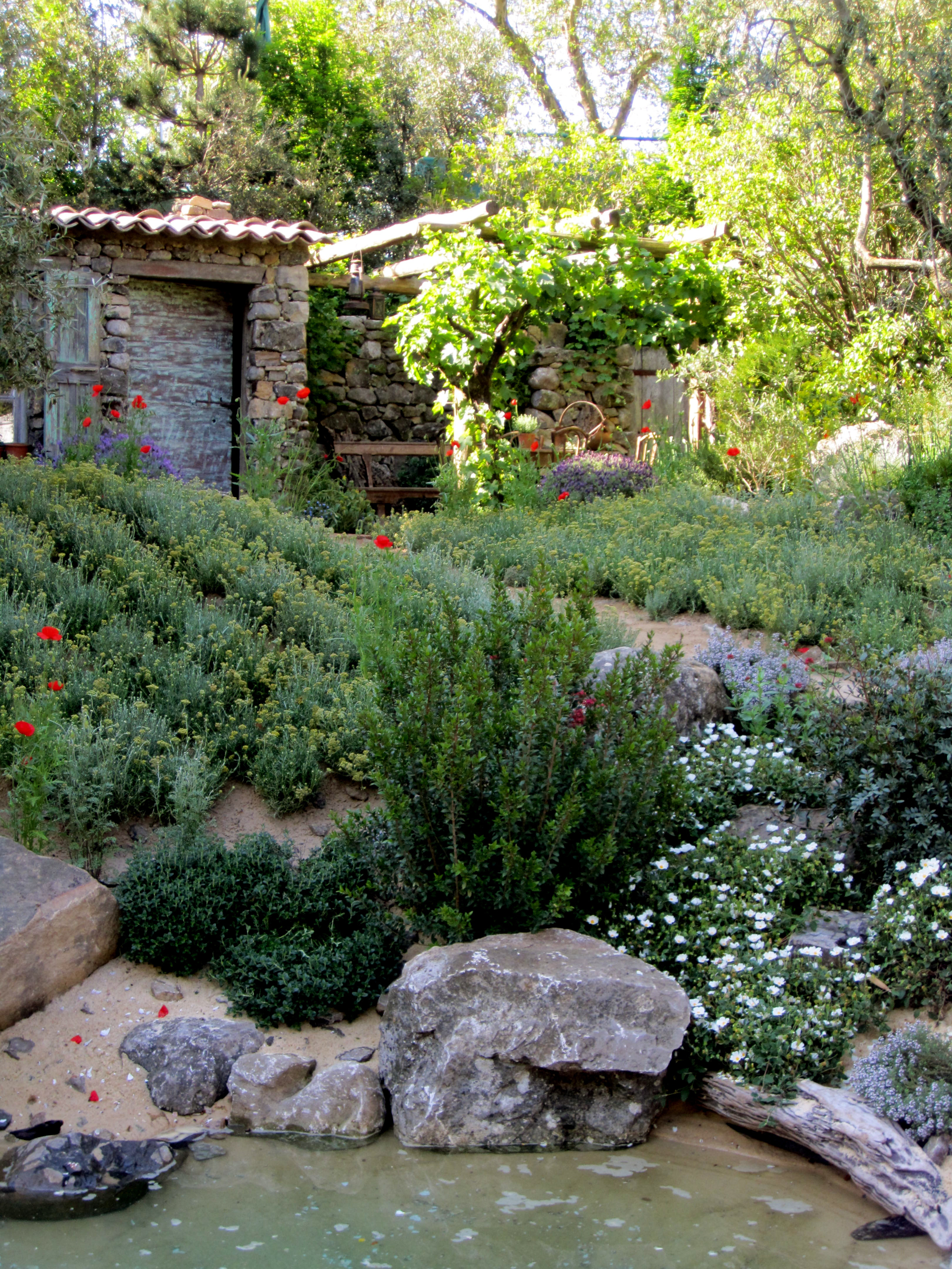 Cabanon, treille et romarin à Chelsea